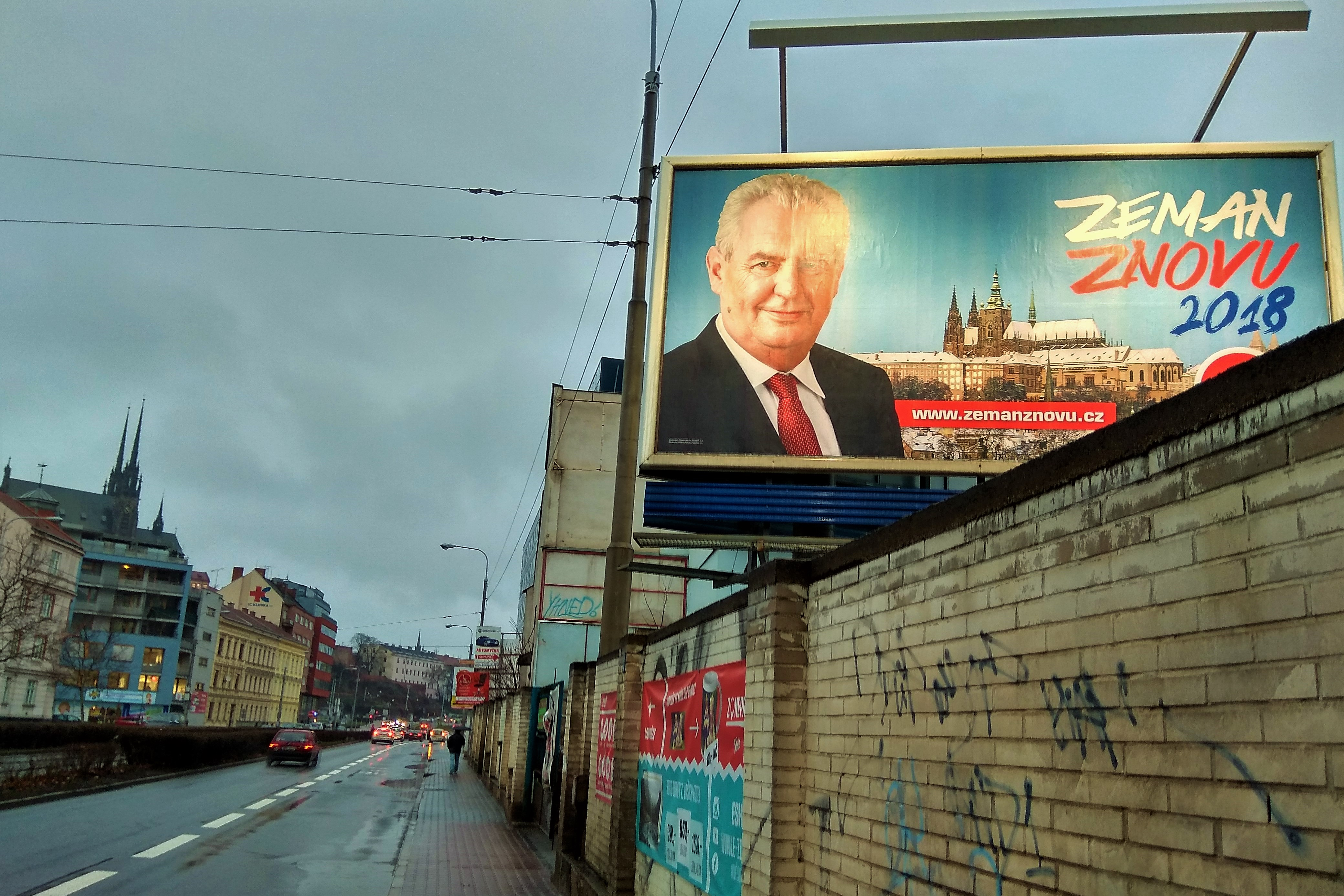 Billboard z volební kampaně Miloše Zemana před volbou prezidenta České republiky v lednu 2018. Reklamní plocha v ulici Nové sady v Brně, v pozadí vlevo katedrála na Petrově.